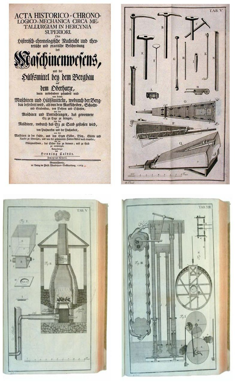 Auszug aus dem Buch Acta Historico-Chronologico-Mechanica circa metallurgiam in Hercynia superiori von Henning Calvör